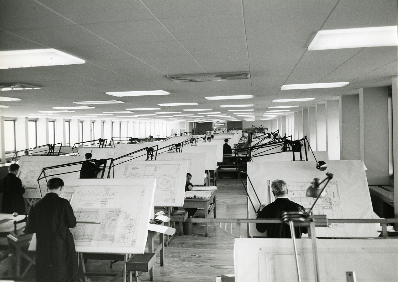 Sesto San Giovanni. Sala disegnatori e uffici dell'industria Ercole Marelli. Servizio fotografico : Sesto San Giovanni, 1963 / Paolo Monti. - Stampe: 3 : Positivo b/n, gelatina bromuro d'argento/ carta, 24x30. - ((Al verso delle stampe manoscritto: 7288, 7291, 7296. La suddetta serie è contenuta nella scatola identificata con la numerazione 136. Sul coperchio della scatola manoscritto: "t. 02/34.909.65/ Paolo Monti/ Corso sempione 28/ 20154 Milano/ Procida - 1". - Fonte: Rubrica di Paolo Monti: Archivio fino 1-4-1961/ 31-3-1963 (1961-1963), presso Archivio Paolo Monti